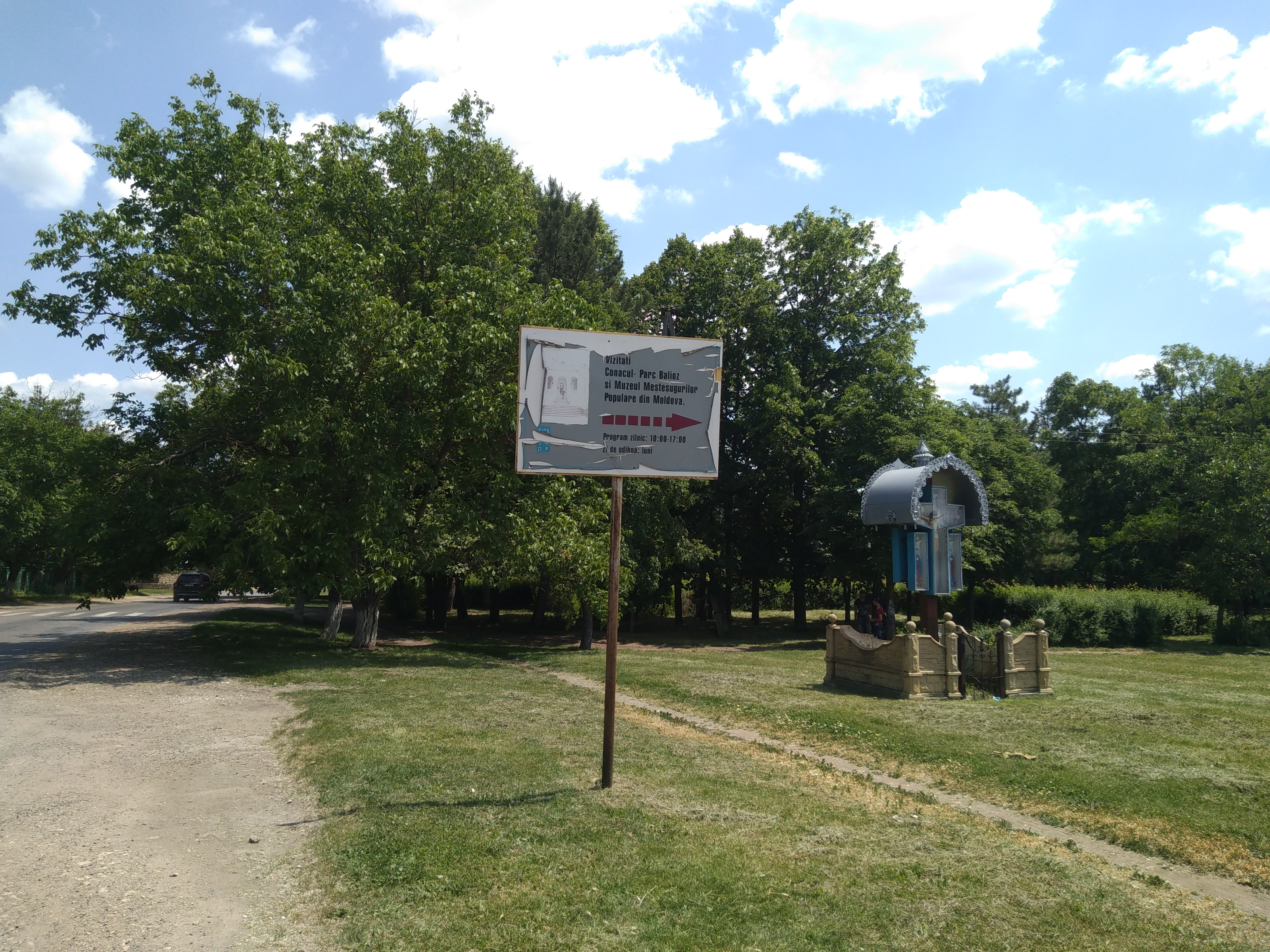 Parcul din satul Ivancea, monument al naturii amplasat în raionul Orhei, satul Ivancea (cod MD-OR-map-017)